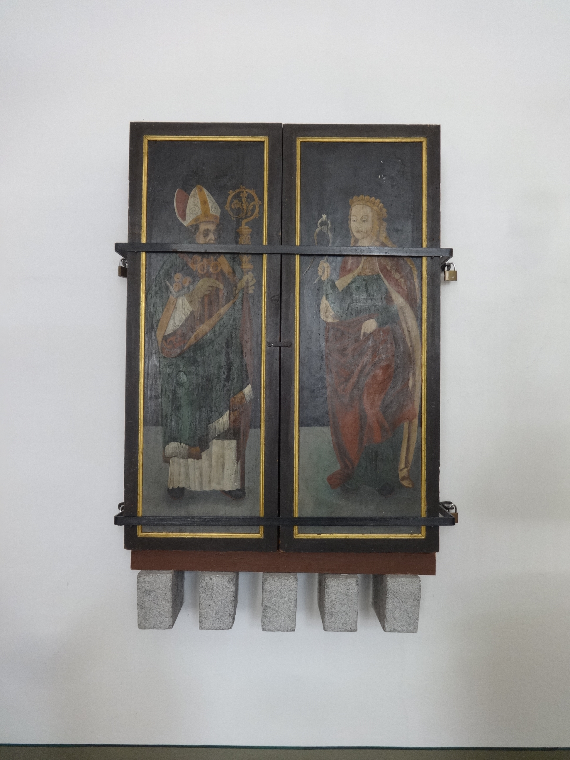 Die evangelische Dorfkirche Schenkendorf entstand vermutlich Ende des 14., Anfang des 15. Jahrhunderts. Die Feldsteinkirche wurde in den Jahren 1662 bis 1669 erheblich umgebaut. In seinem Innern befinden sich ein Altarrtabel und eine Kanzel aus dem 17. Jahrhundert sowie ein Schnitzaltar aus dem Jahr 1516. Er zeigt im geöffneten Zustand die Mondsichelmadonna, während im geschlossenen Zustand Nikolaus von Myra und Apollonia von Alexandria zu sehen sind.